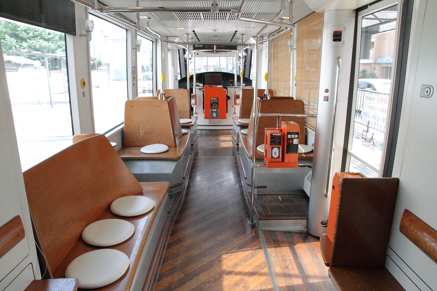 岡山電気軌道9200形9201Bの車内。連結部側から運転台側に向って撮影。内装の使用材木はシルキーオーク材。